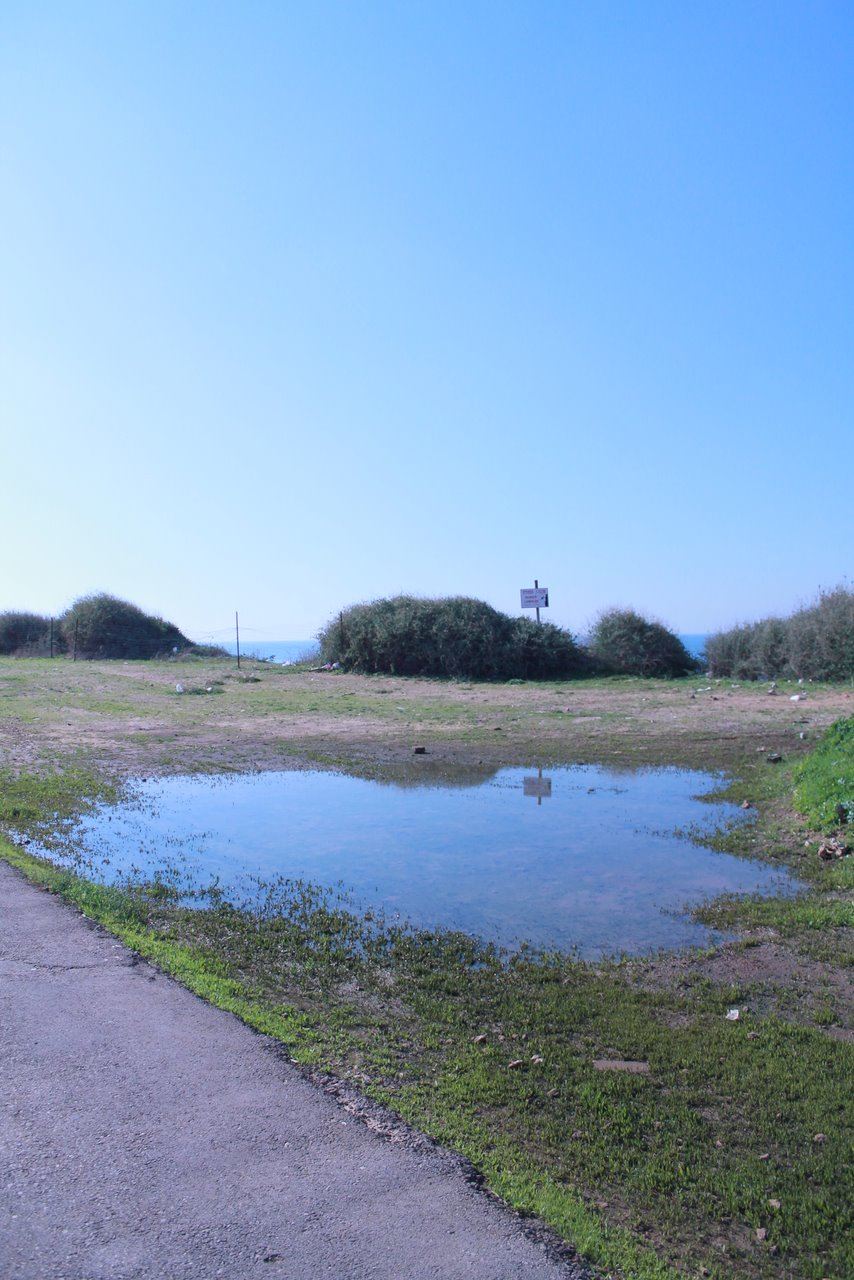 פשוט שלולית